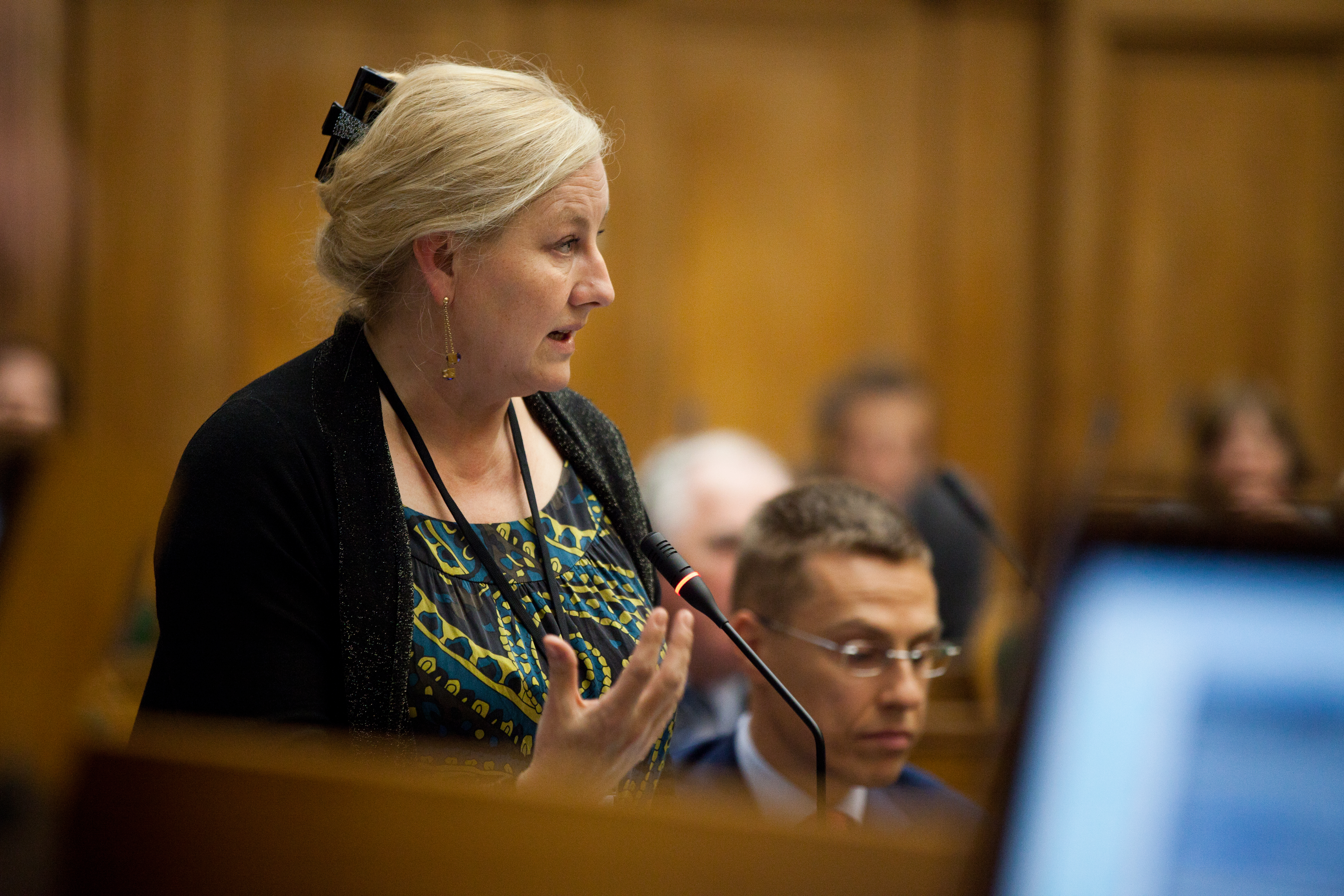 Ewa Björling vid Nordiska Rådets session 2011 i Köpenhamn.